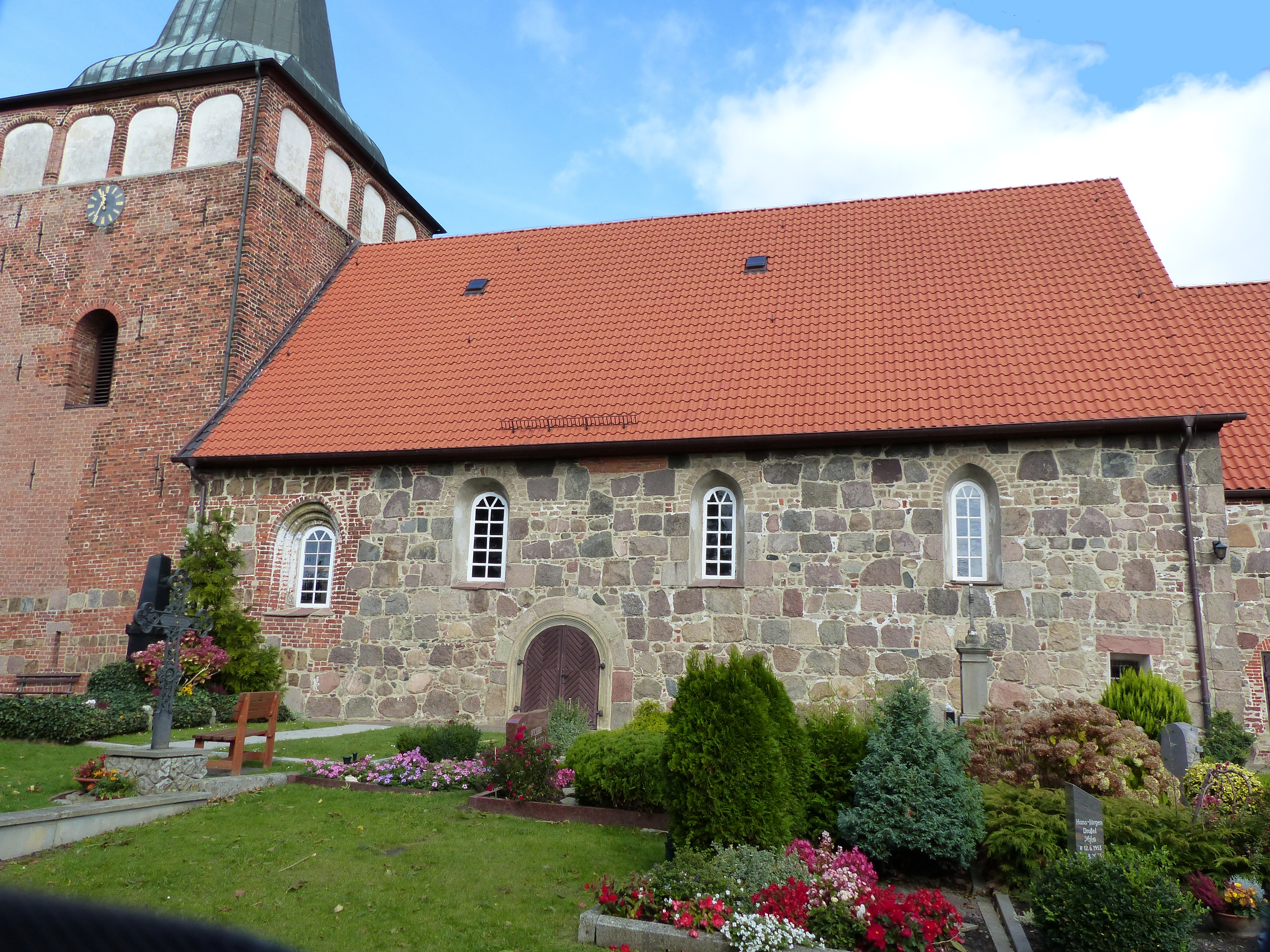 Marienkirche Mulsum von Süden